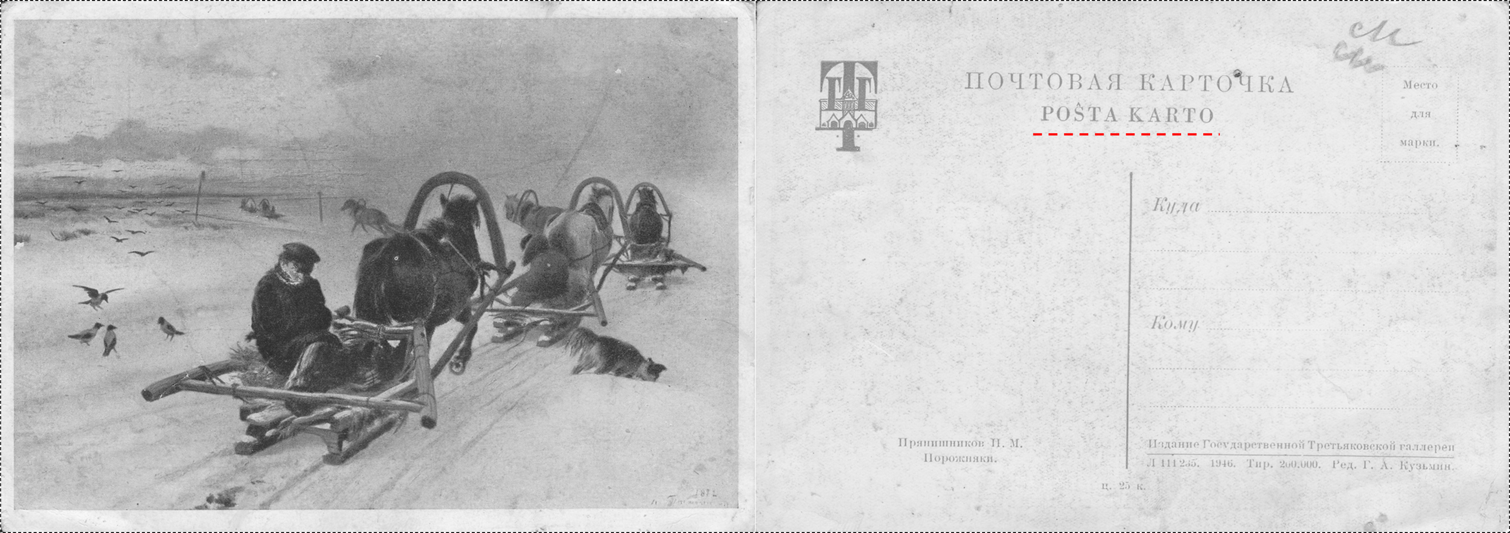 Открытка с надписями на русском и эсперанто